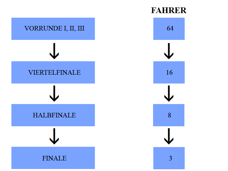 Turnierverlauf Deutsche Meisterschaft